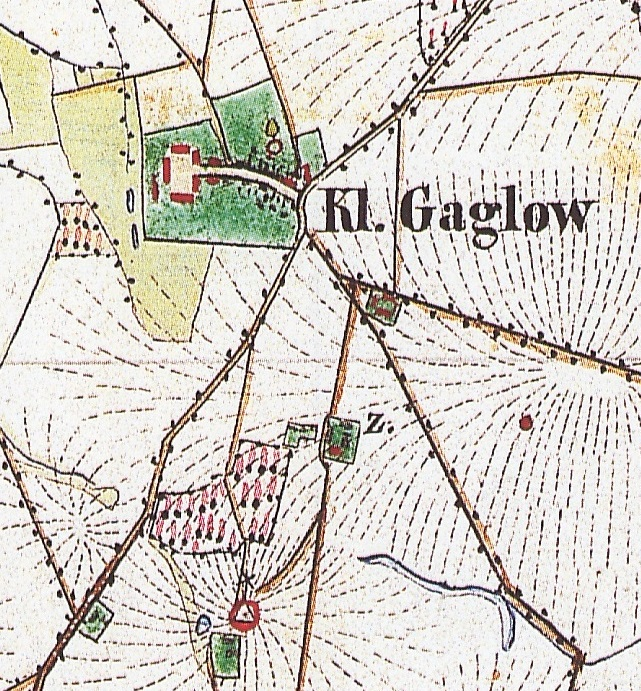 Klein Gaglow, Ortsteil der Gem. Kolkwitz, Landkreis Spree-Neiße, Brandenburg, Ausschnitt aus dem Urmesstischblatt 4251 Cottbus West von 1846